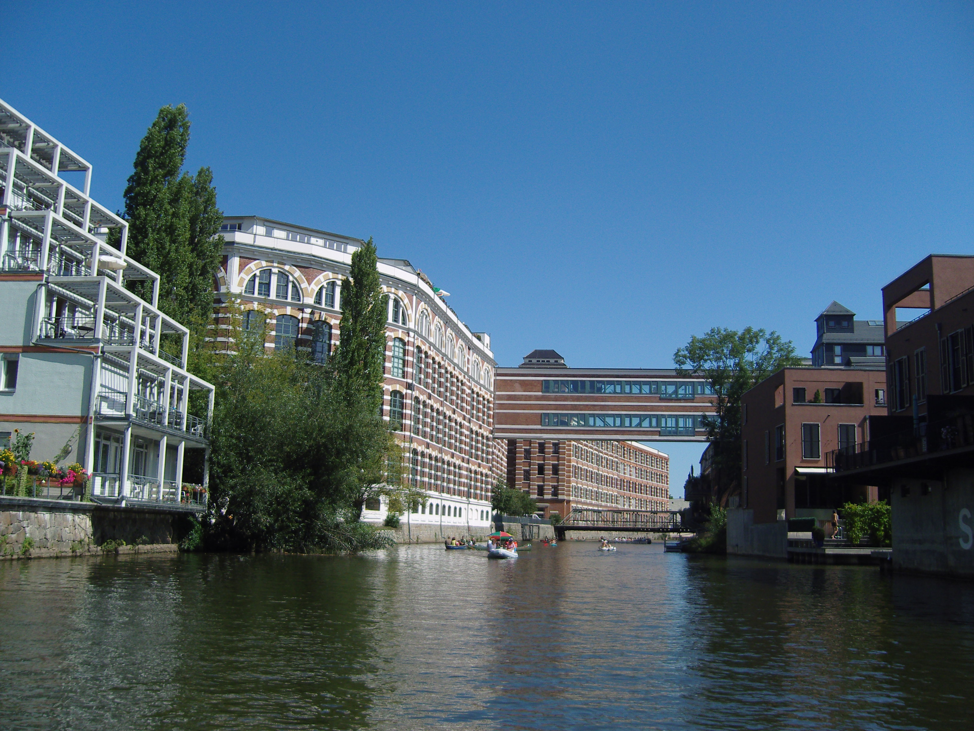 Ehemalige Sächsische Wollgarnfabrik an der Weißen Elster in Leipzig; links zwischen den Bäumen der Beginn des Karl-Heine-Kanals